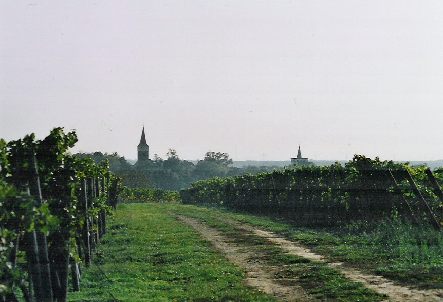 Ansicht von Minfeld (Westen) mit Weinbergen